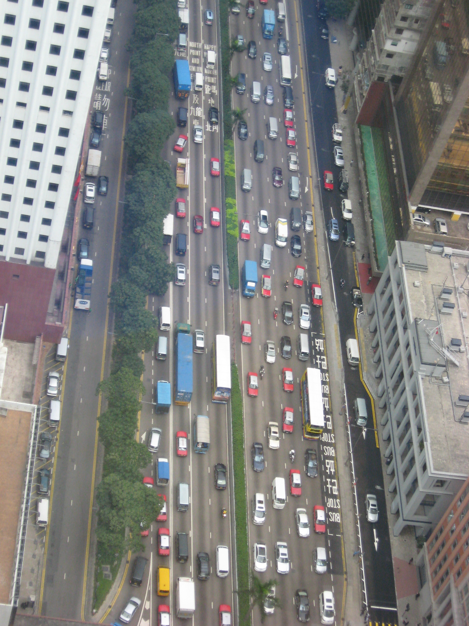 Gloucester Road